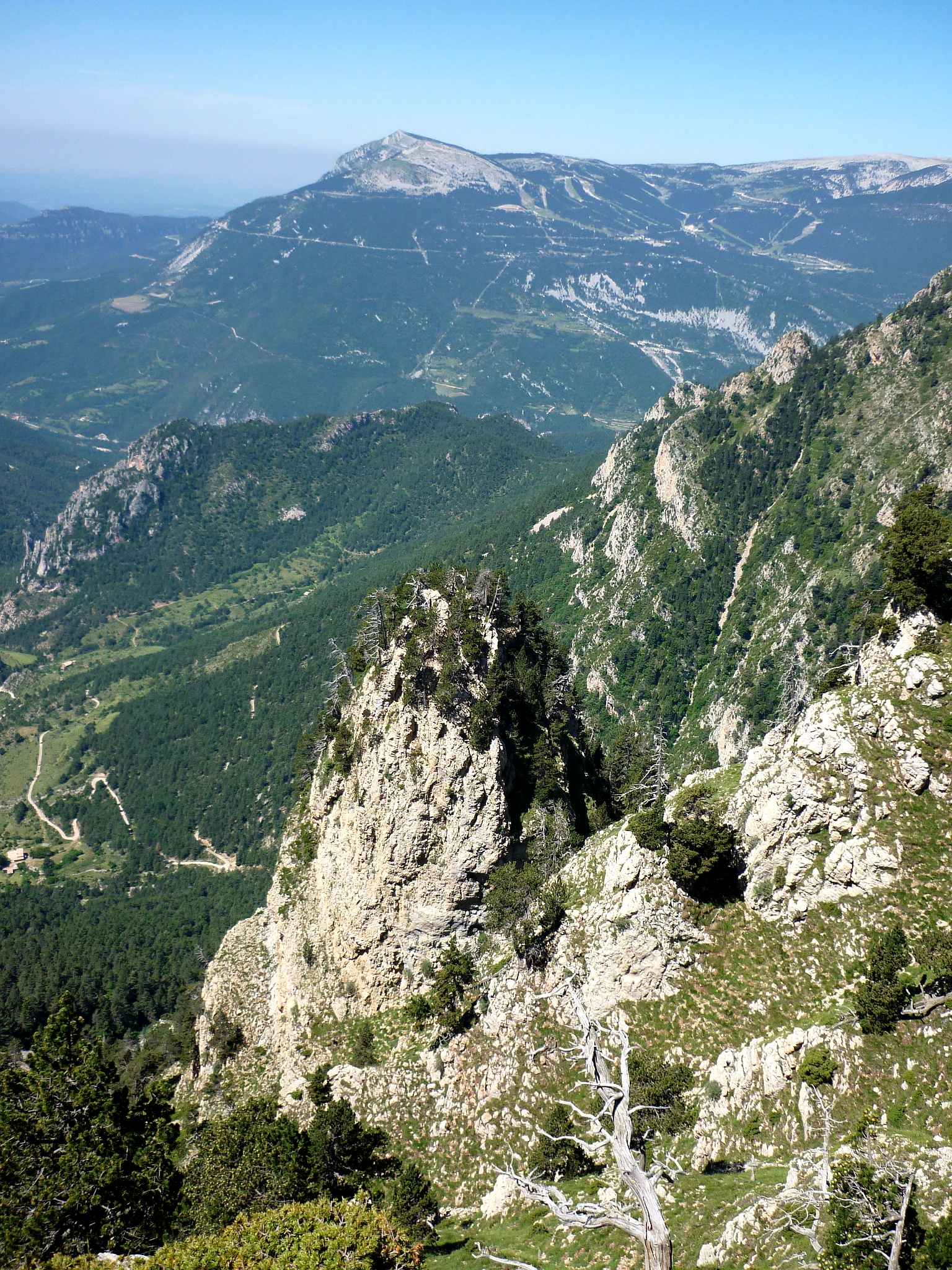 El Castell Gumiá, merlet enmig de la canal que baixa dels Tres Collets